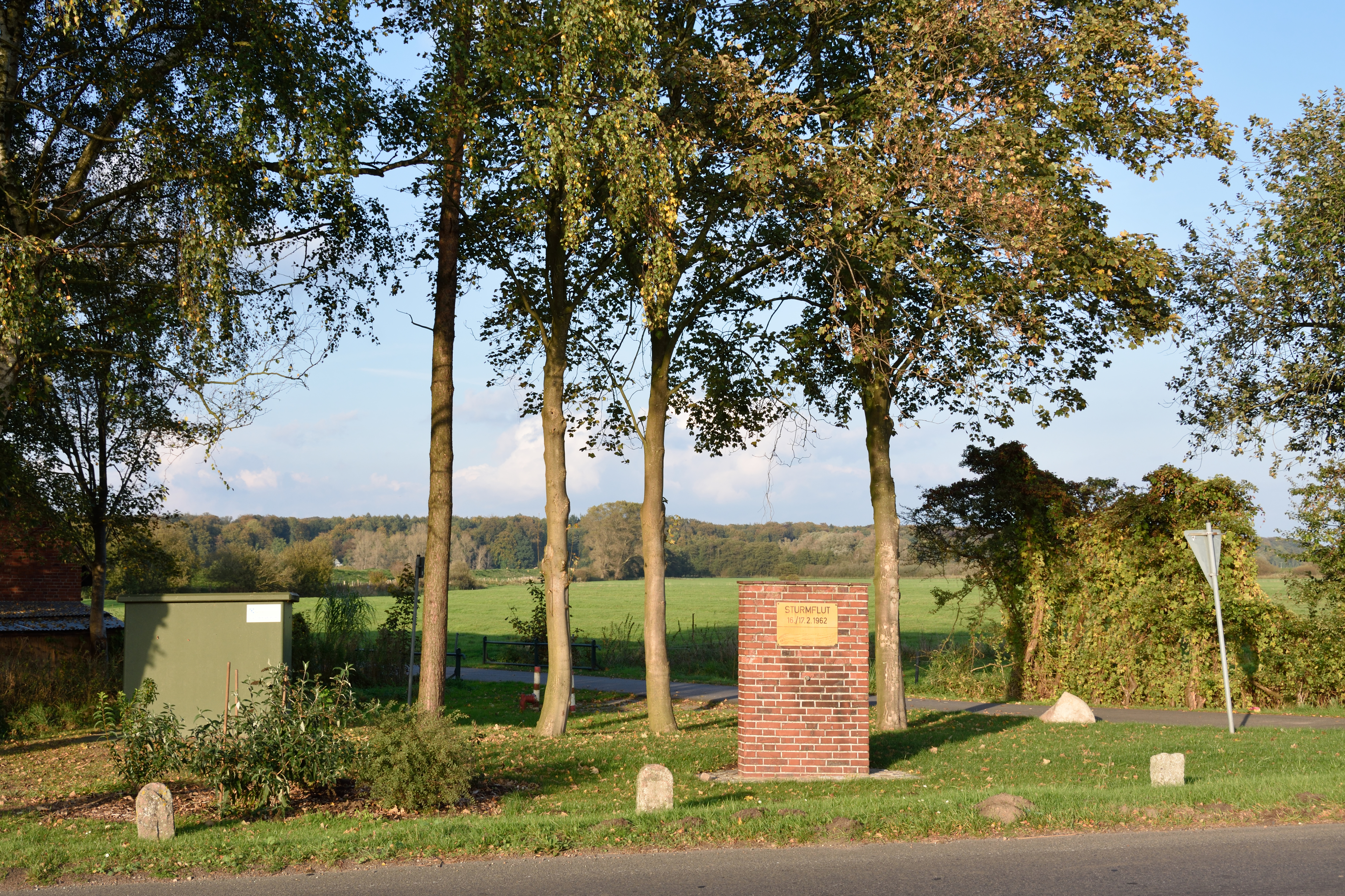 Erinnerung an die Sturmflut 1962 in Münsterdorf